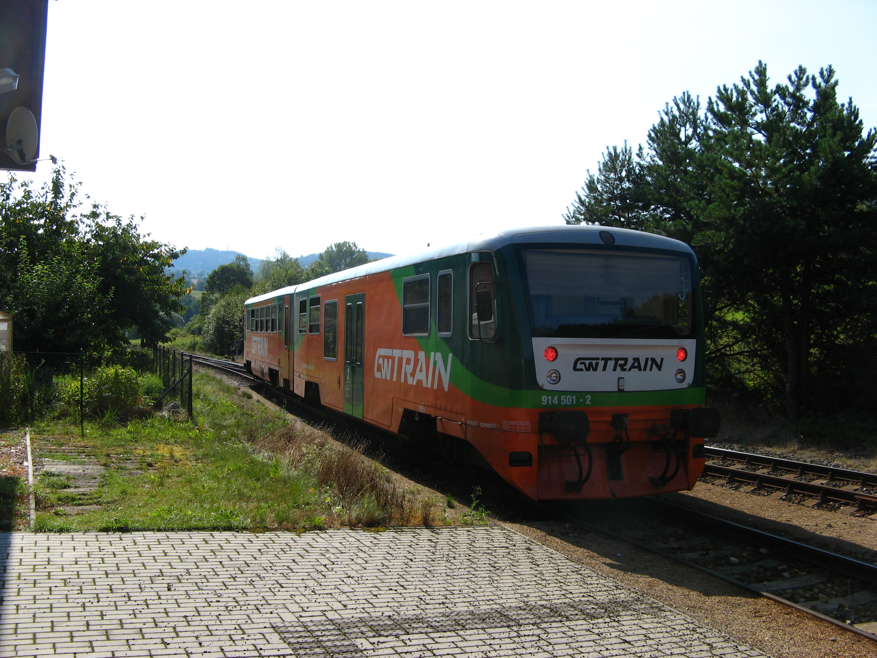 Motorová jednotka 814.501/914.501 odjíždí ze stanice Bohumilice v Čechách